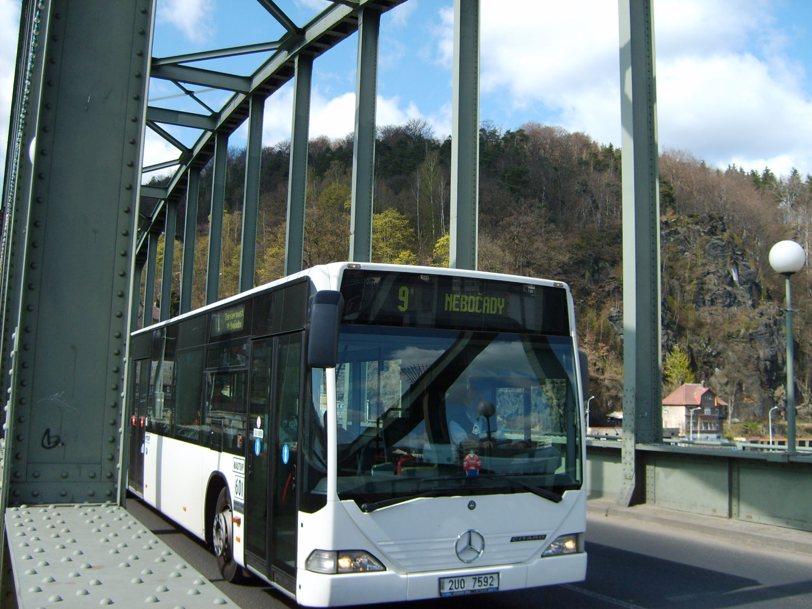 Autobus MHD Děčín linky 9 do Nebočad na Tyršově mostě přes Labe.